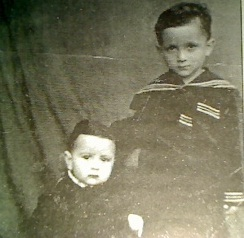 Из личного архива Махира Джавадова